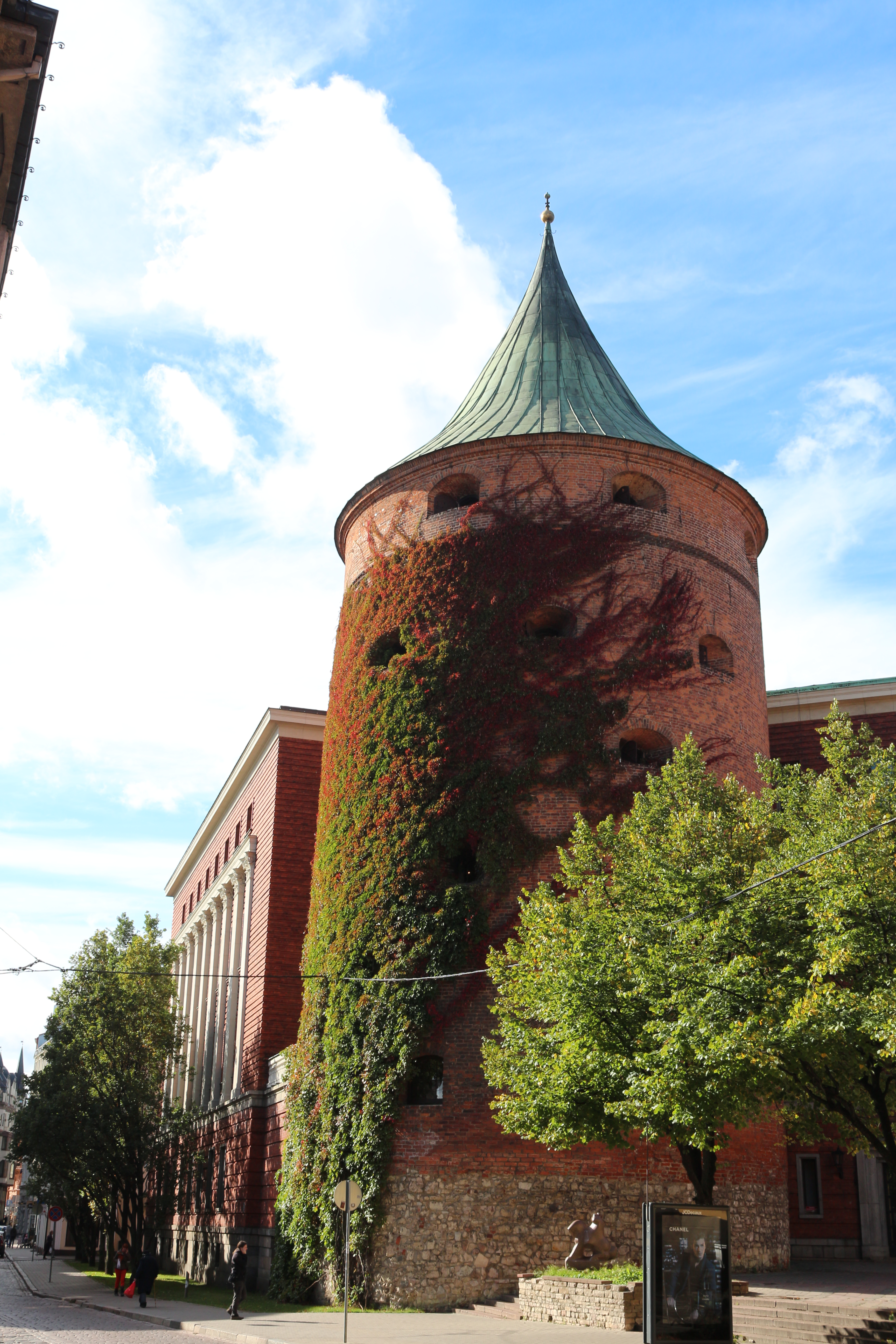 Єдина вежа фортечної стіни, що зберіглася до наших днів.